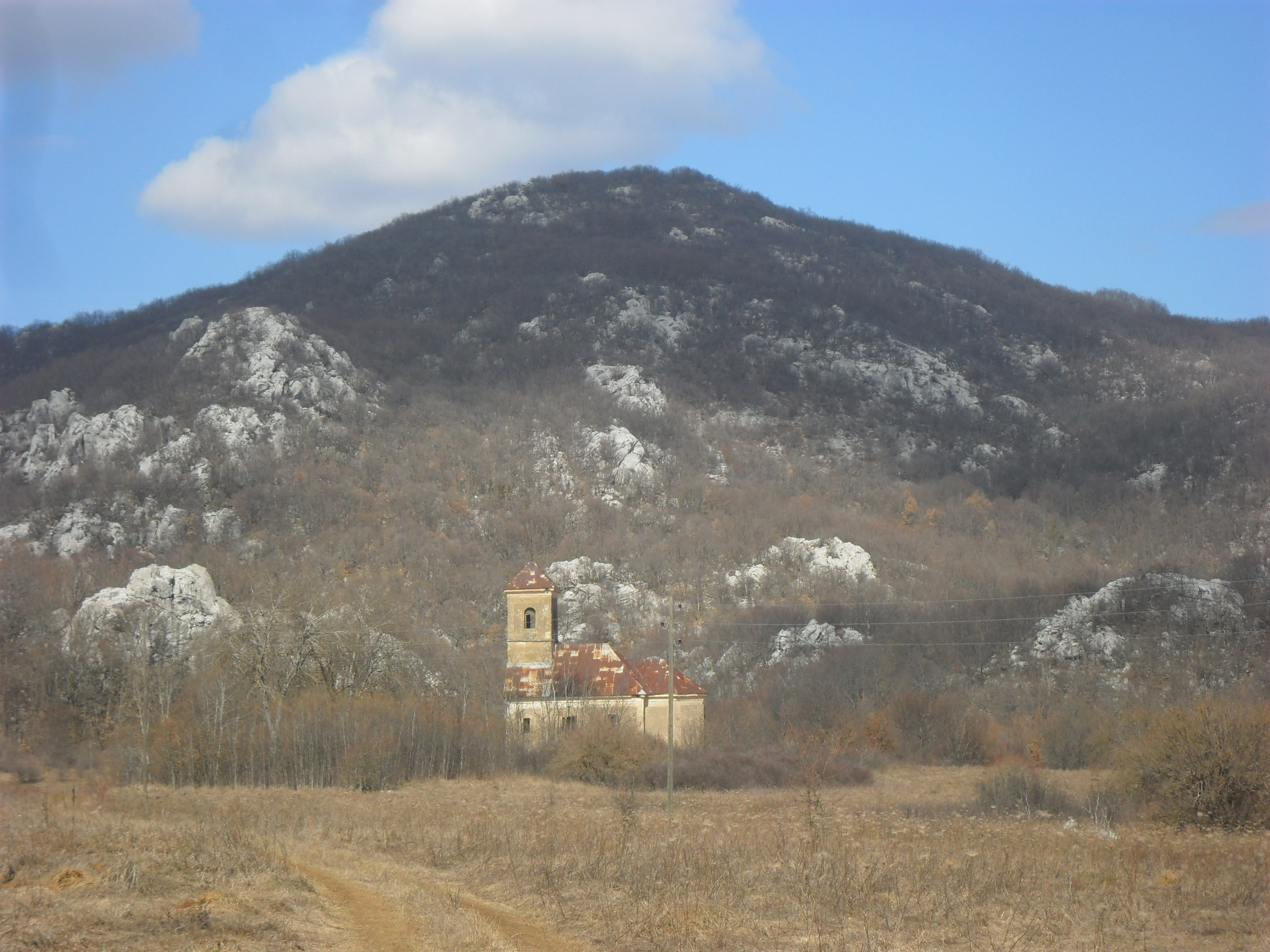 Crkva